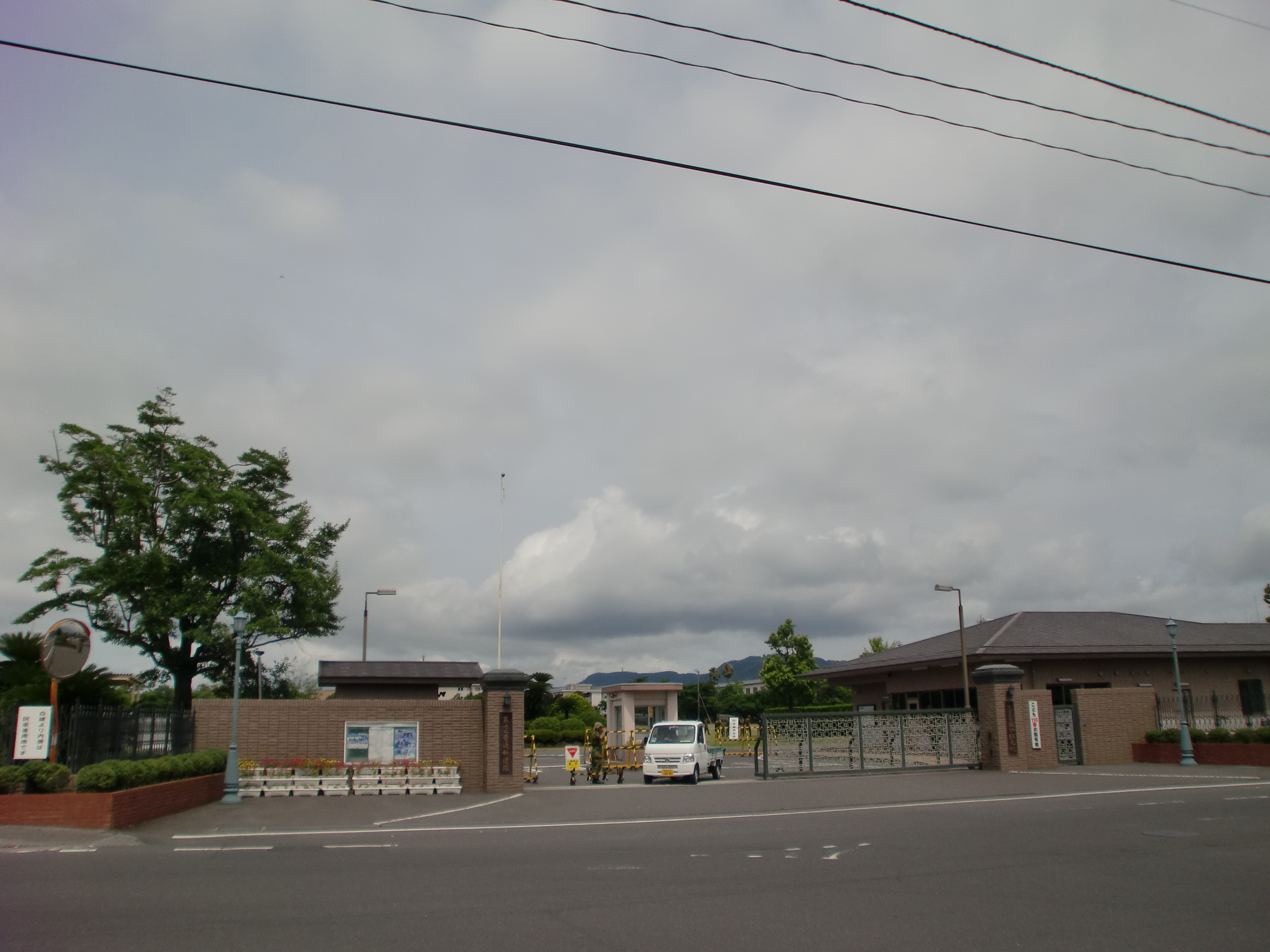 陸上自衛隊国分駐屯地の正門。